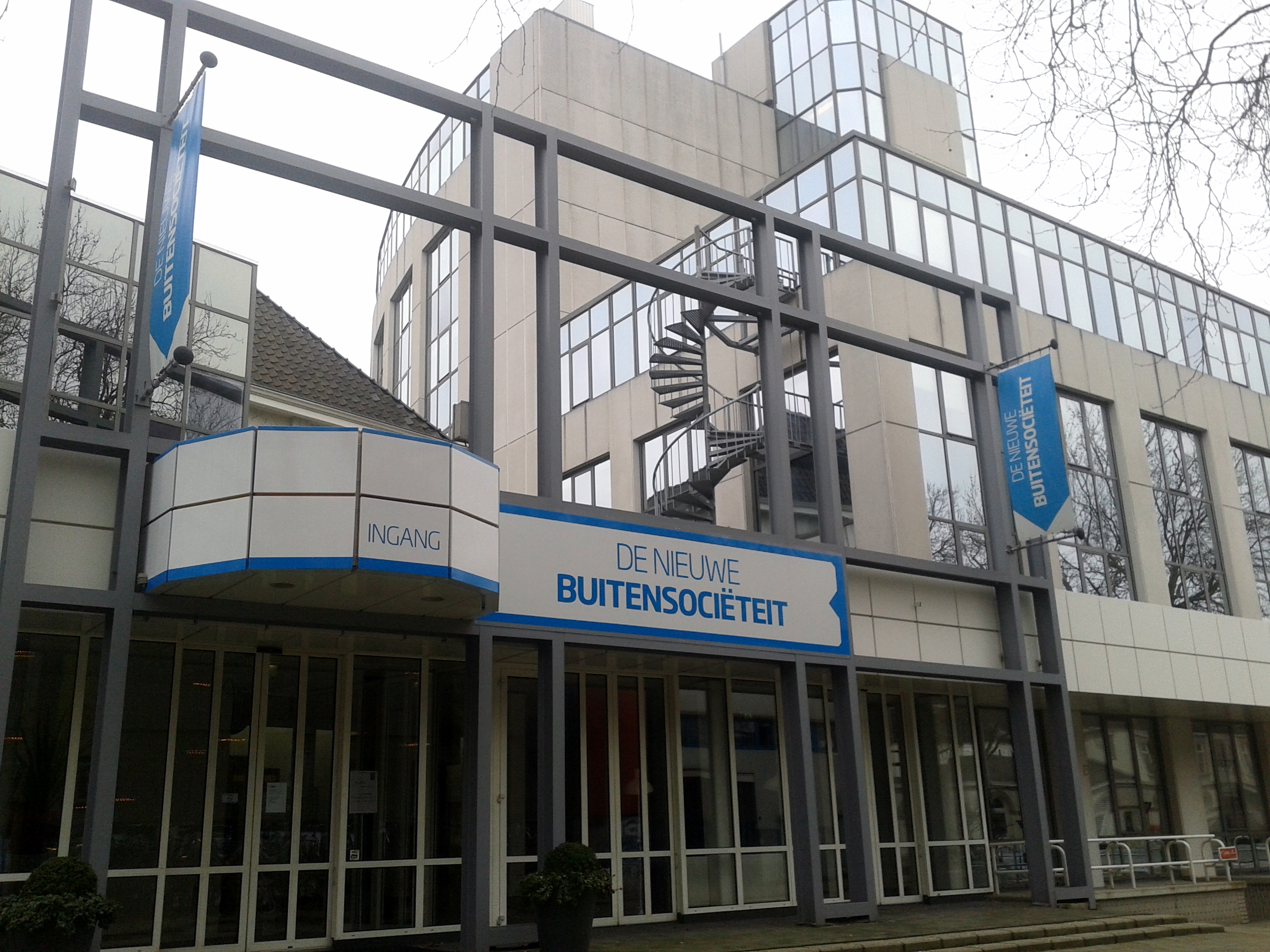 Ingang Nieuwe Buitensociëteit Zwolle.